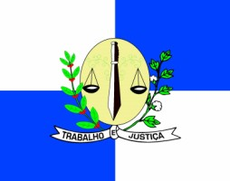 A Bandeira do Município de Lupionópolis, interpretada heraldicamente pela Coordenação da ESIMPAR (Enciclopédia Simbológica Municipalista Paranaense), será de forma retangular, na proporção de 14 (quatorze) módulos de largura e 20 (vinte) módulos de comprimento, de acordo com o Art. 5º da Lei Federal nº 5.700, de 01/09/1971, conforme modelo em anexo, apresentando as seguintes características: A Bandeira é esquartelada, nas cores azul e branca, sendo o quartel superior (do lado da adriça) na cor branca e, o inferior, na cor azul. No lado esquerdo as cores são opostas: azul(superior) e branca (inferior). No centro da Bandeira figura uma área ovalada, na cor amarela, que simboliza a riqueza do município e sob esta, a figura de uma balança, em preto e branco, símbolo da justiça. Na parte inferior da área oval, há um listel em branco, unindo o ramo de café ao de algodão, com a seguinte inscrição em preto: “TRABALHO E JUSTIÇA”.